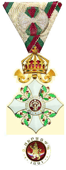 Bulgaarse Orde van Civiele Verdienste aan lint met rozet. Ook het medaillon op de keerzijde is afgebeeld.